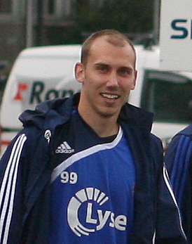 Jone Samuelsen